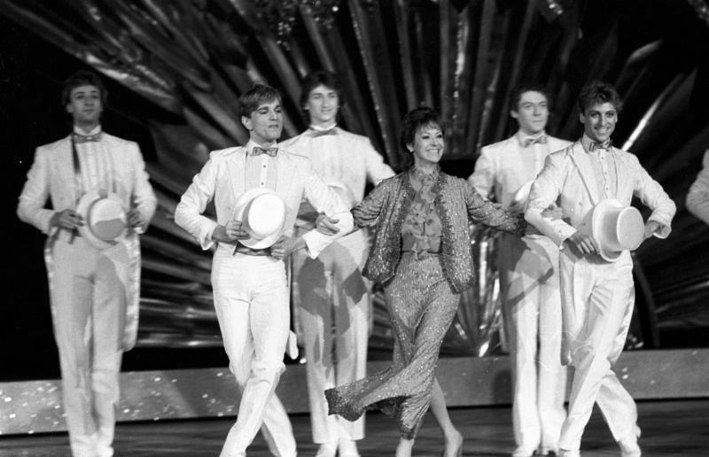 Berlin, Friedrichstadtpalast, Caterina Valente ADN-ZB / Franke / 13.1184 / Berlin: Mit "Variete, Variete" hob sich im Friedrichstadtpalast der Premierenvorhang zum zweiten Programm nach der Wiedereröffnung. Zu den Mitwirkenden der Revue gehörte Caterina Valente aus der Schweiz. Abgebildete Personen: Valente, Caterina: 1931- ; Sängerin, Schauspielerin, Tänzerin, Italien (GND 118805398)